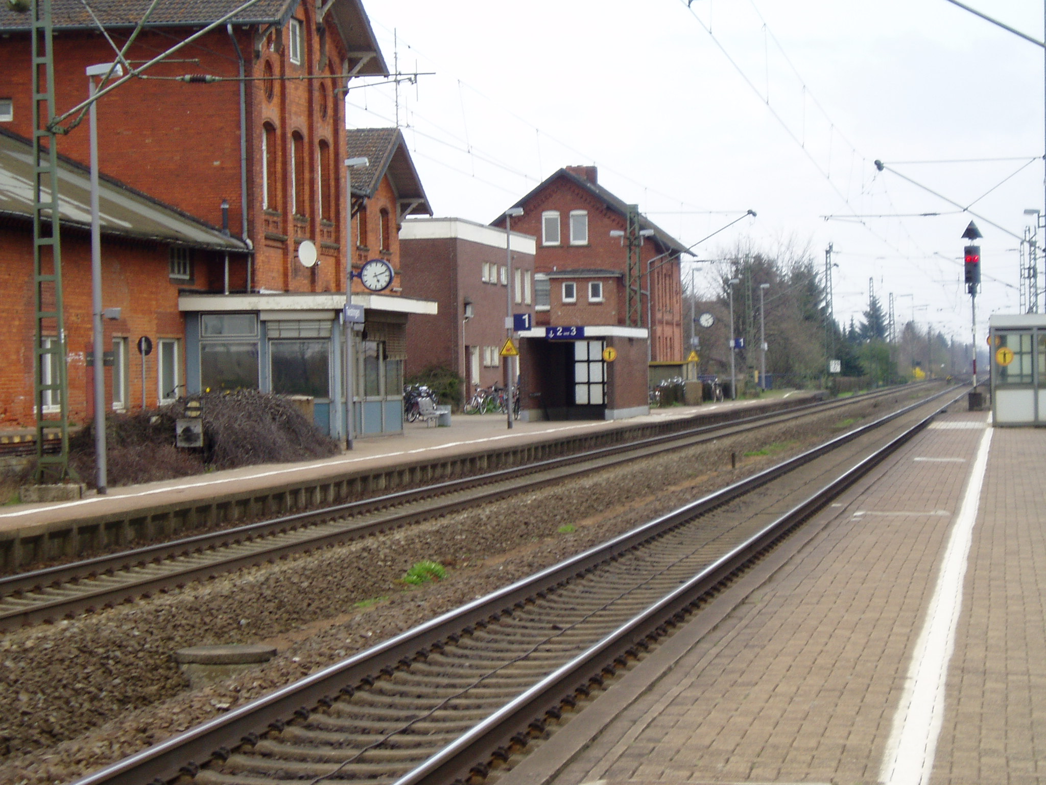 Twistringer Bahnhof, Aufnahme vom Gleis 2. Twistringen, Niedersachsen, Deutschland. Sonstiges: Bild entspricht immer noch dem aktuellen Bahnhof (Stand: Mai 2006)